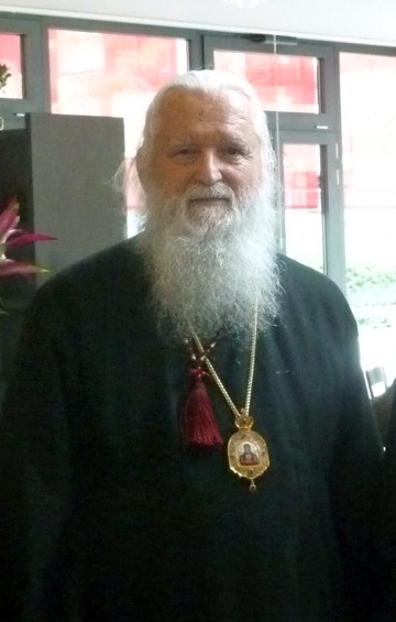 Епископ Михаил (Донсков)